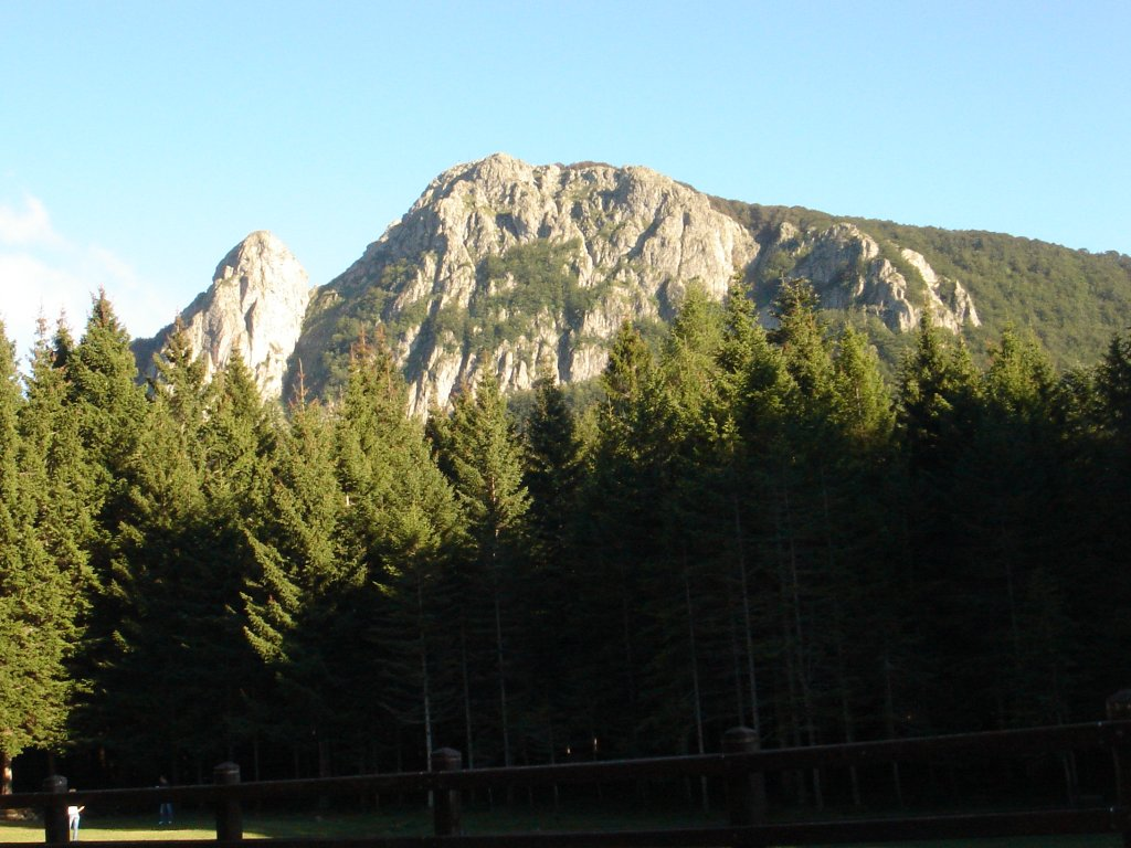 Monte Penna visto dalla ex casermetta della Forestale. Agosto 2006. I, the author of this work, hereby publish it under the following licenses